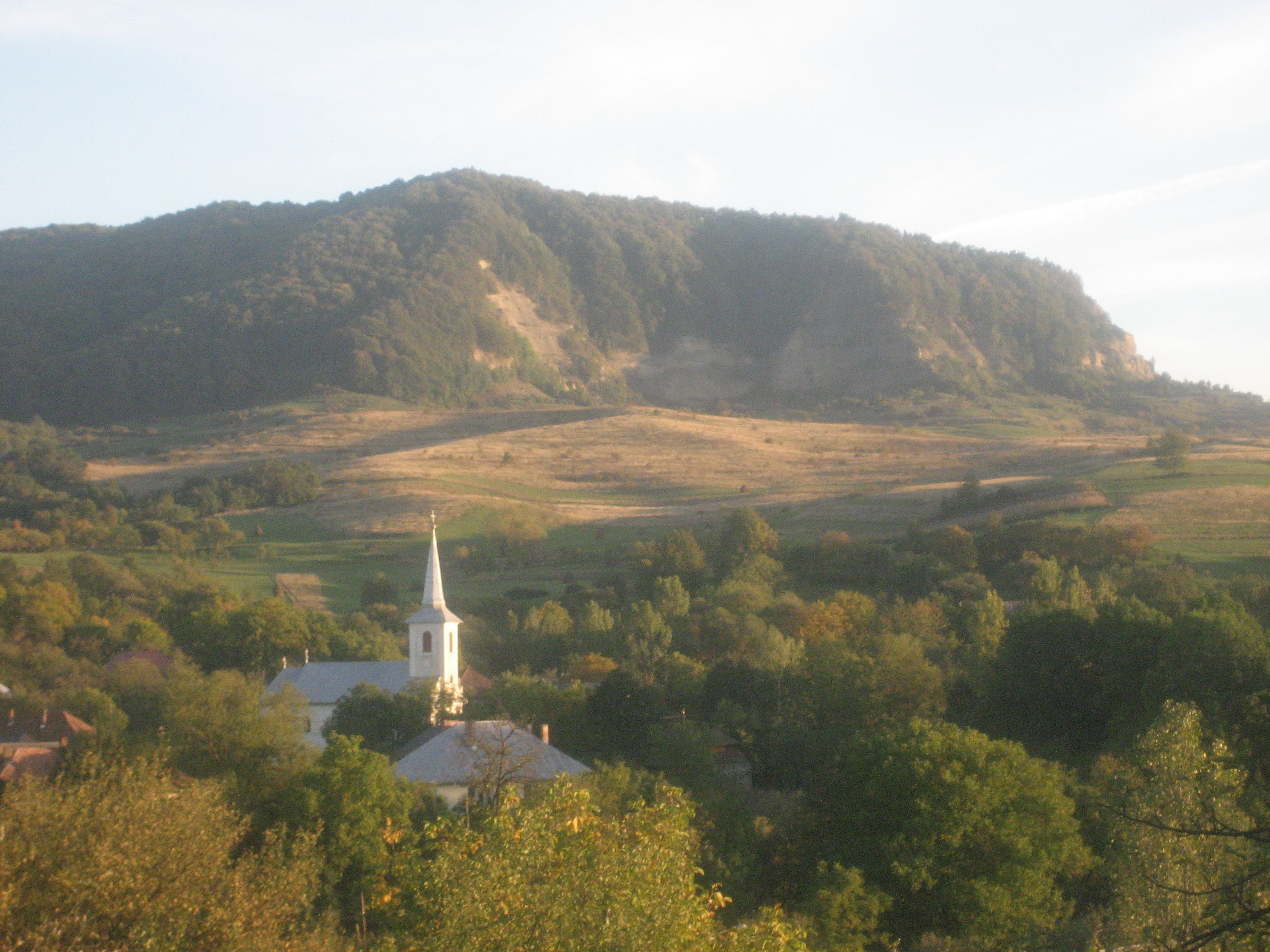 vedere asupra satului